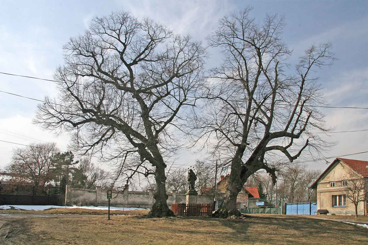 Památné lípy u sochy Svatého Jana Nepomuckého v Žehuni